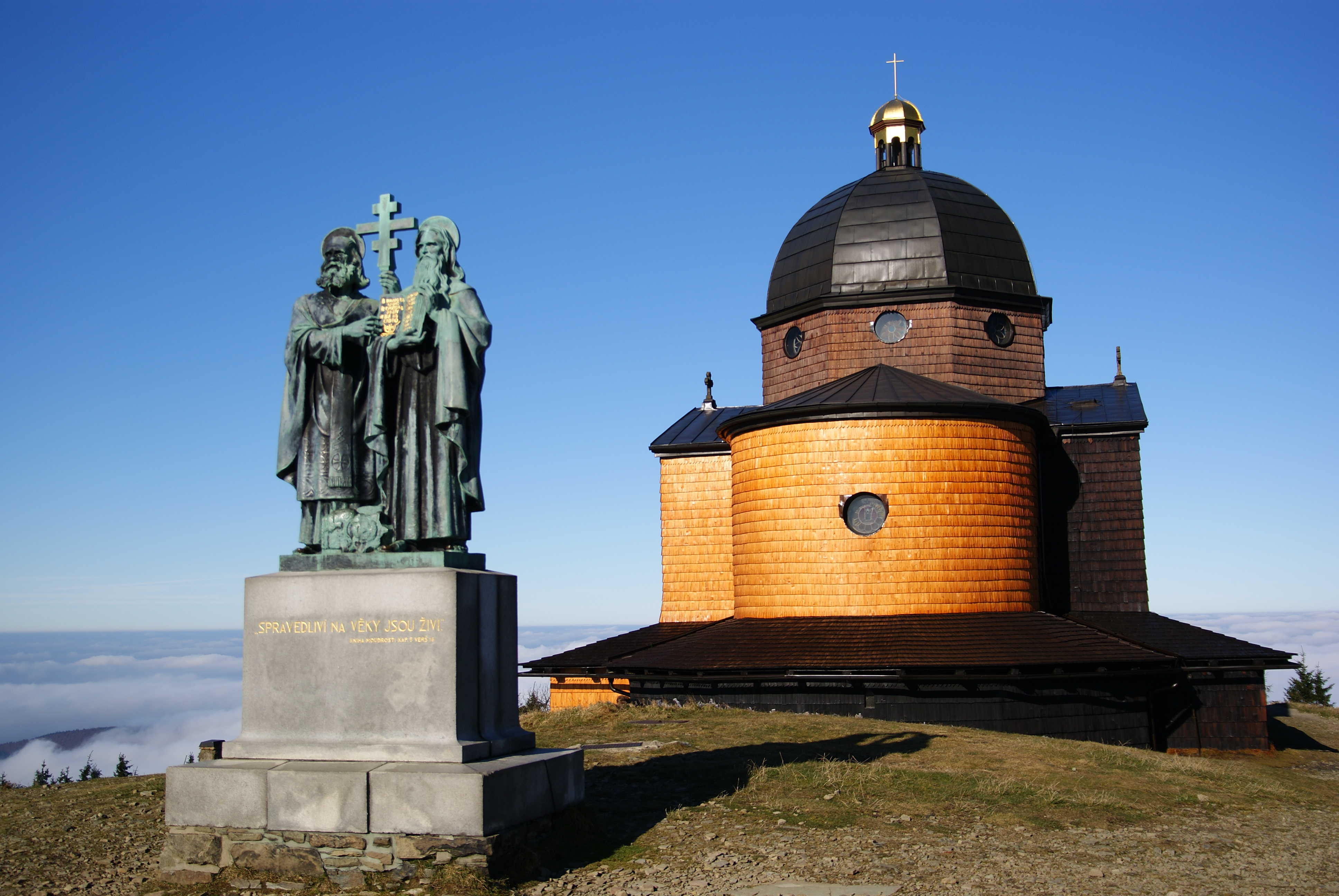 Kaple sv. Cyrila a Metoděje (Dolní Bečva), Radhošť, Dolní Bečva